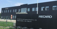 RECARO Aircraft Seating, Firmengebäude Standort China